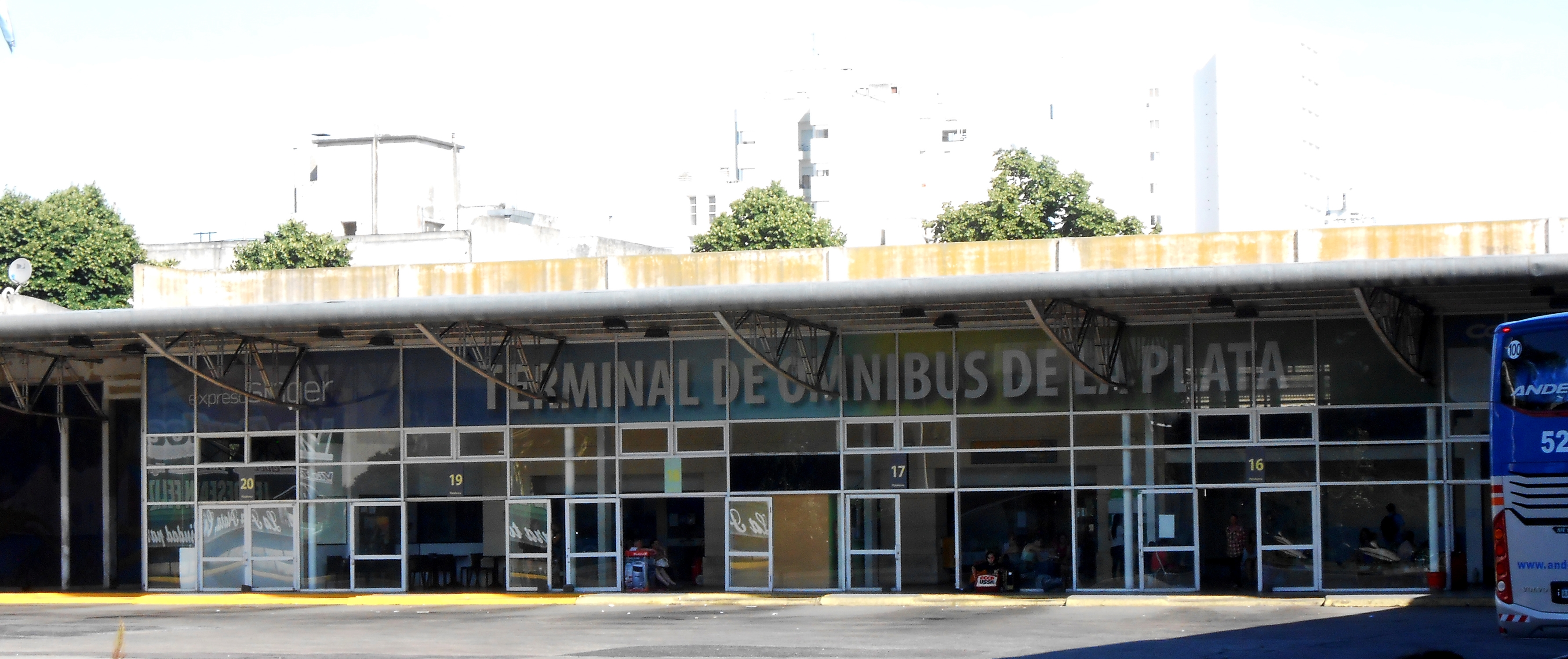 Terminal de La Plata, parte interna, Provincia de Buenos Aires. Argentina.